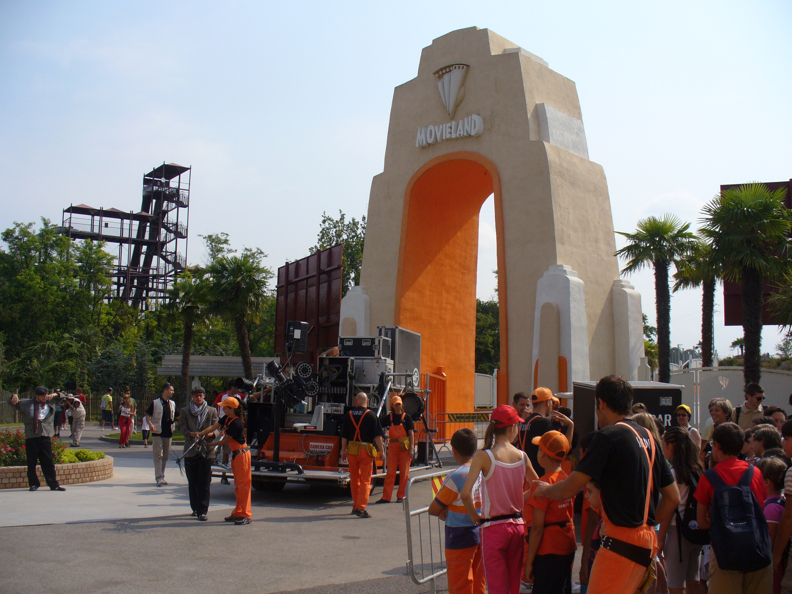 l'ingresso del parco tematico movieland studios ex movie studios park, lazise sul garda, Verona (Italy)